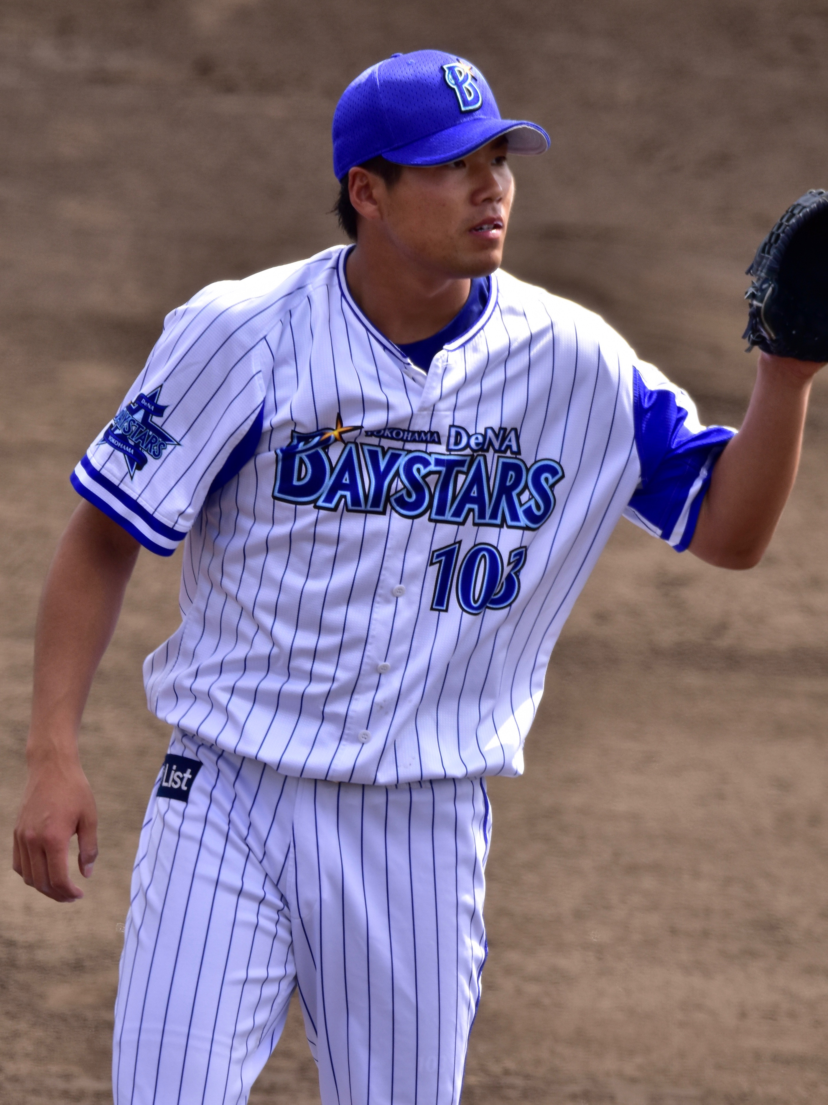 宜野湾市立野球場にて